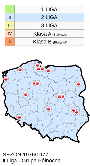 Jagiellonia w sezonie 1976/77 - mapa